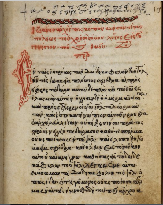 Протоевангелие Иакова. Рукопись 16 века . Британская библиотека